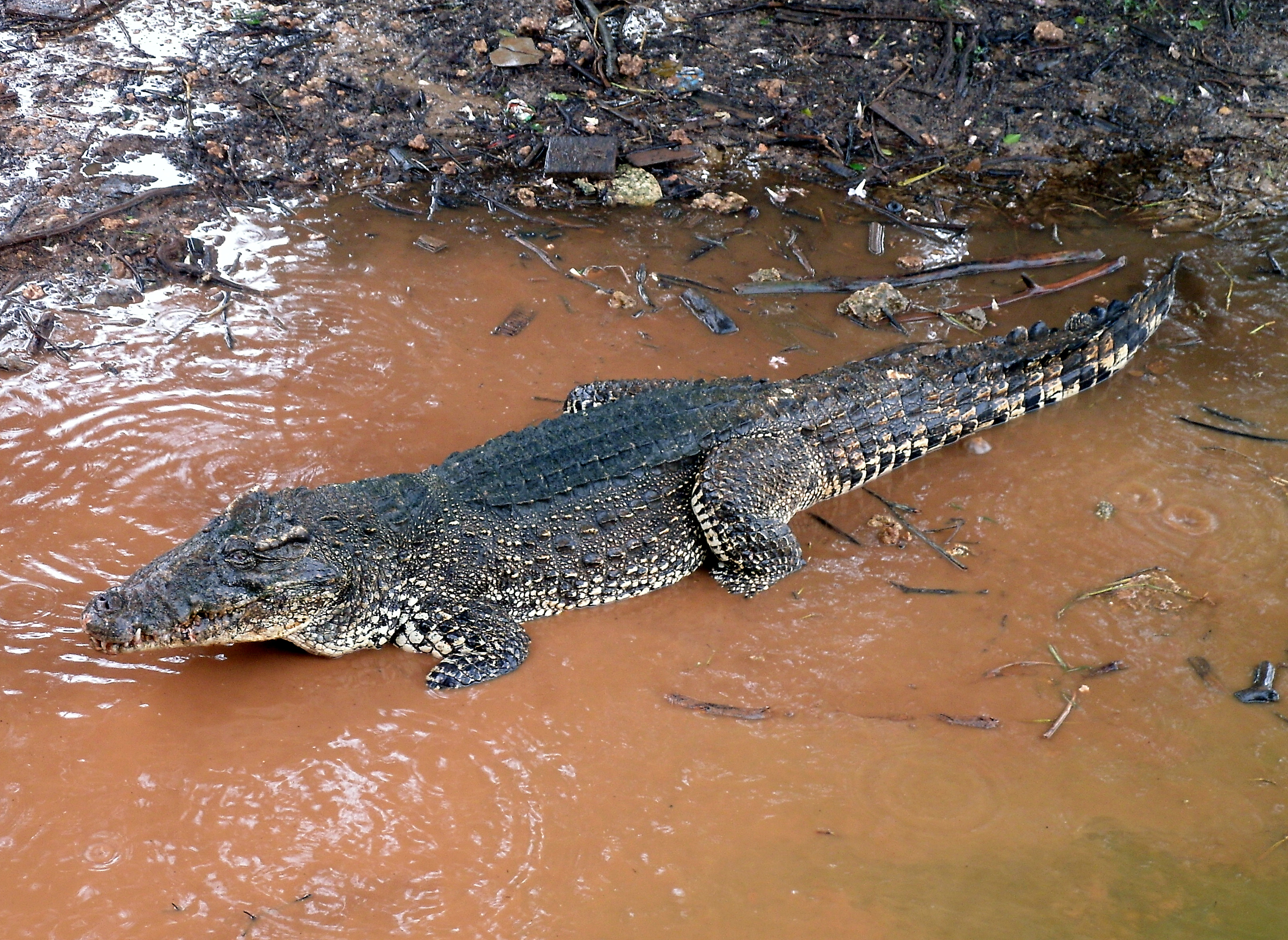 Crocodile dans le marais de Zapata - Province de Matanzas, Cuba.